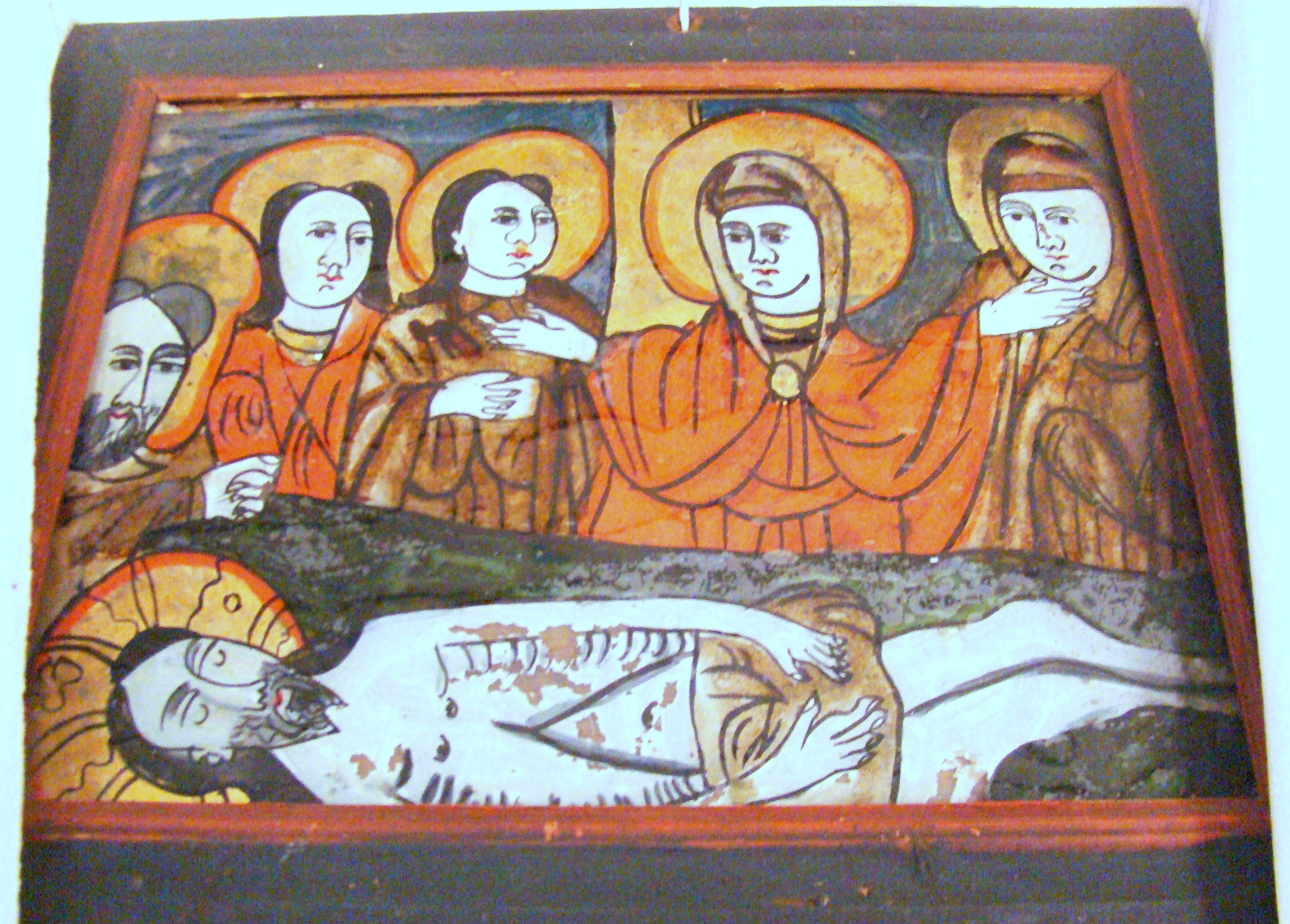 Biserica de lemn "Sfinții Arhangheli Mihail şi Gavril", sat PLOPIŞ; comuna ŞIŞEŞTI